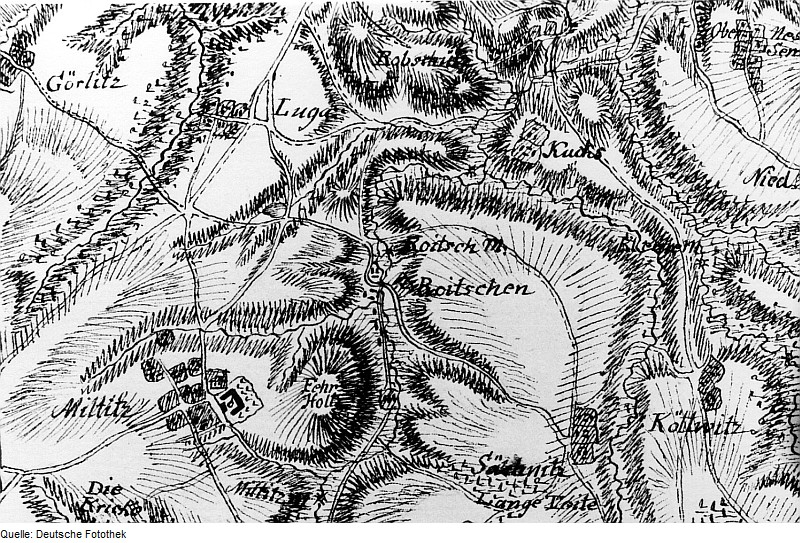 Original image description from the Deutsche Fotothek Triebischtal-Roitzschen. Karte von einem Teil des Kurfürstentums Sachsen, Petri, nach 1759 (Sign.: VII 63)